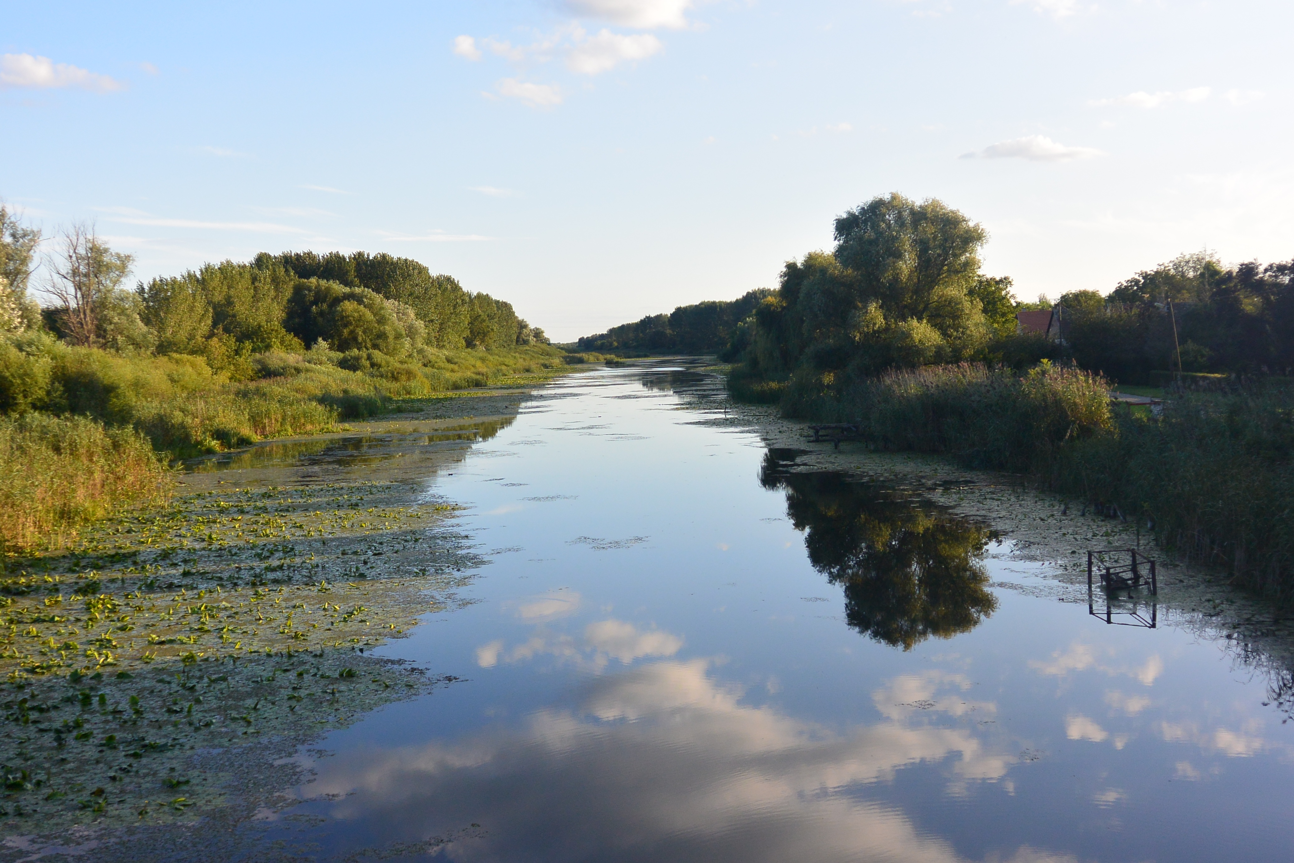 A Ferenc-csatorna Dávod és Dávod-Püspökpuszta között.